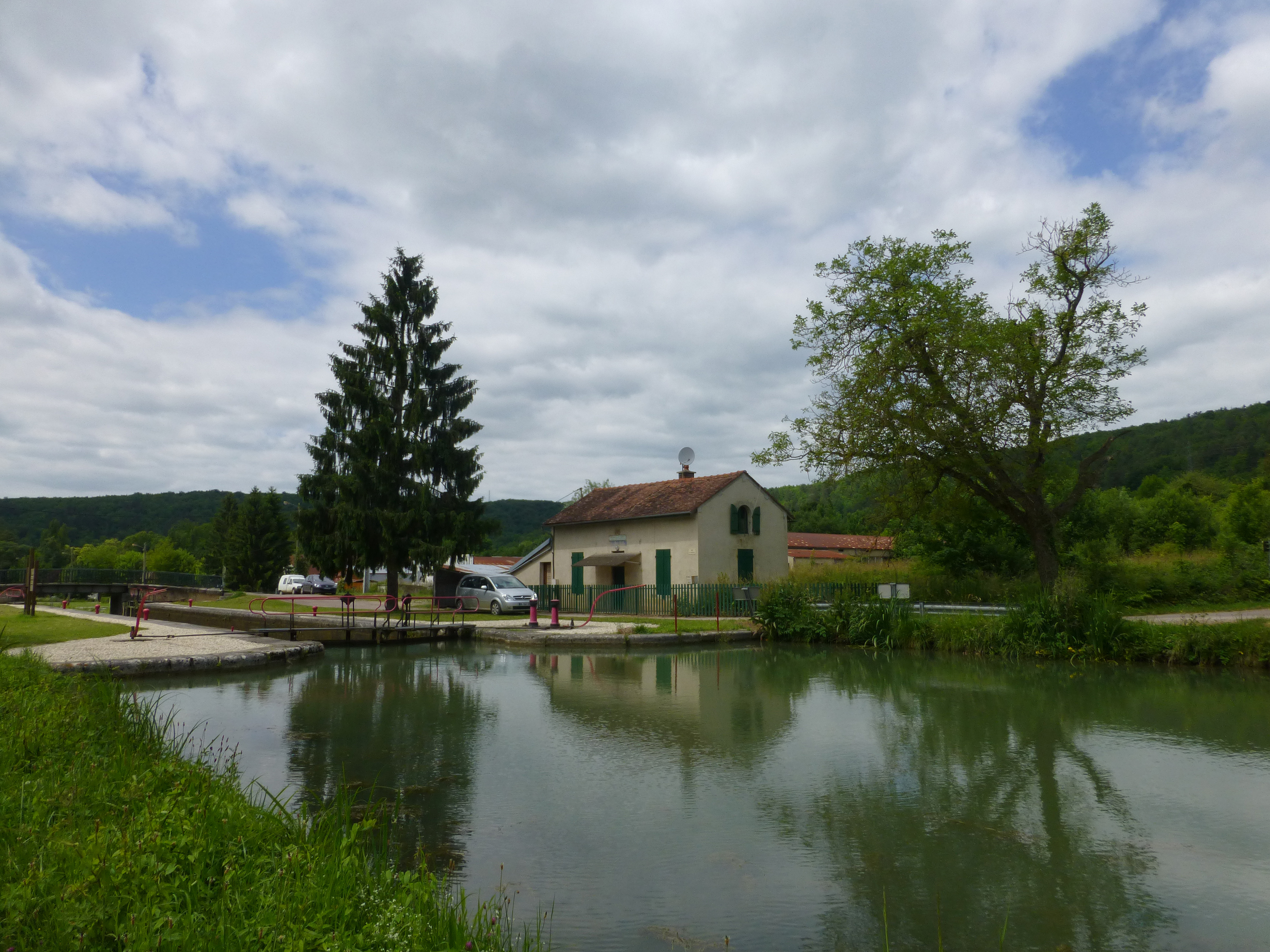 Ecluse de Saint-Rémy (Côte-d'Or) sur le canal de Bourgogne